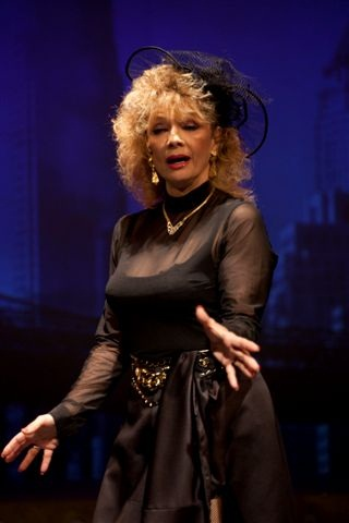 Cohavim Notsetsim תמונה מהצגה ליכתיק ווי די שטערן בתיאטרון יידישפיל